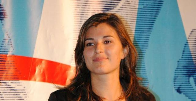 Penelope Riboldi